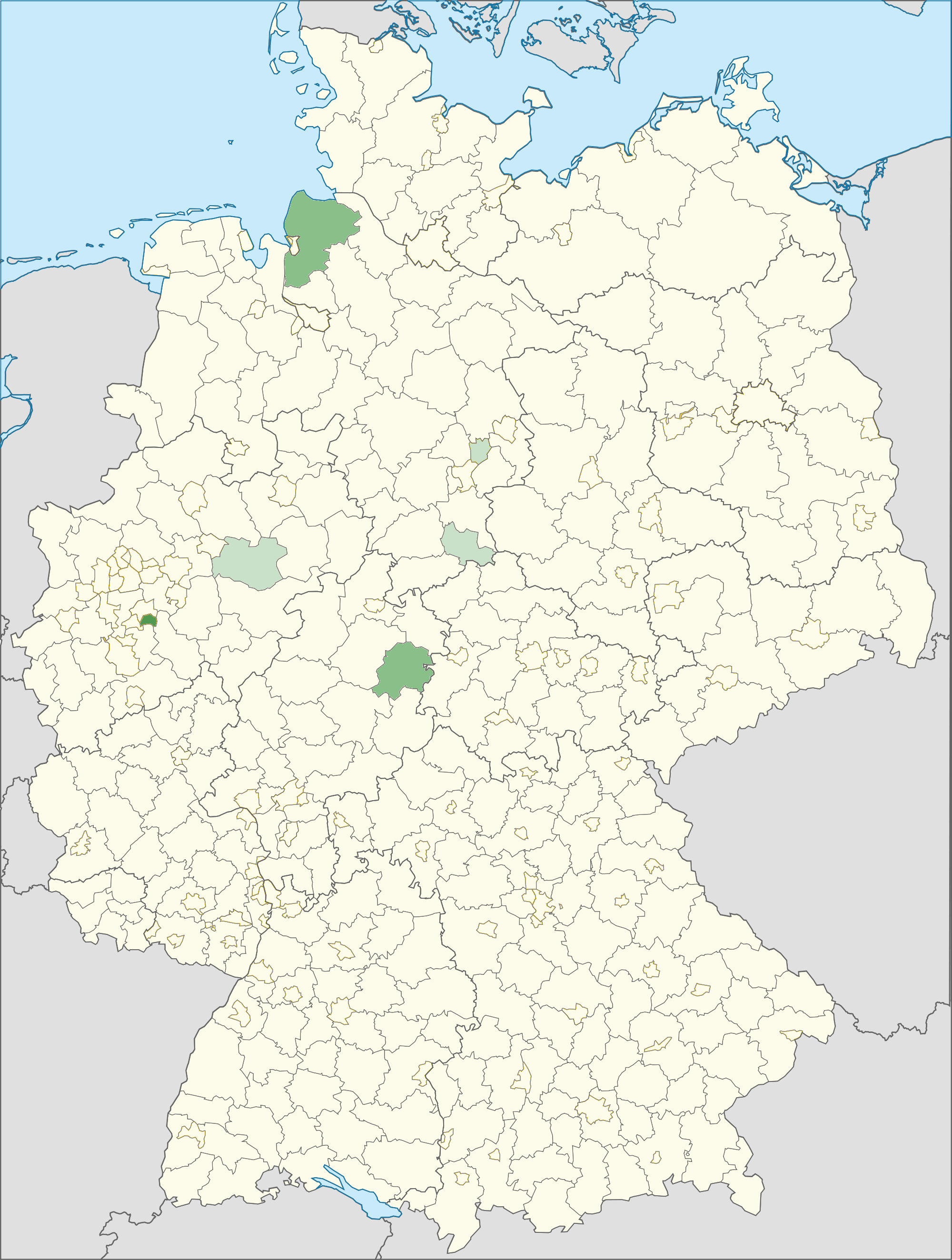 Karte der Personen mit spanischer Staatsangehörigkeit und deren relativer Häufigkeit in den Landkreisen 2014. Dunkelgrün: häufigste ausländische Staatsangehörigkeit in diesem Kreis, hellgrün: fünfthäufigste ausländische Staatsangehörigkeit in diesem Kreis, weiß: sechsthäufig oder weniger. Quelle: Ausländerzentralregister, Stand 31. Dezember 2014. Saarland: keine Daten auf Kreisebene (dargestellt ist die Landesebene). Deutschlandweite relative Häufigkeit der ausländischen Staatsangehörigkeit Spanien: Platz 14.